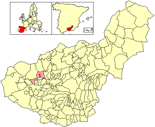 Situación de la localidad de Casanueva (en el municipio de Pinos Puente) respecto a la provincia de Granada, en España.